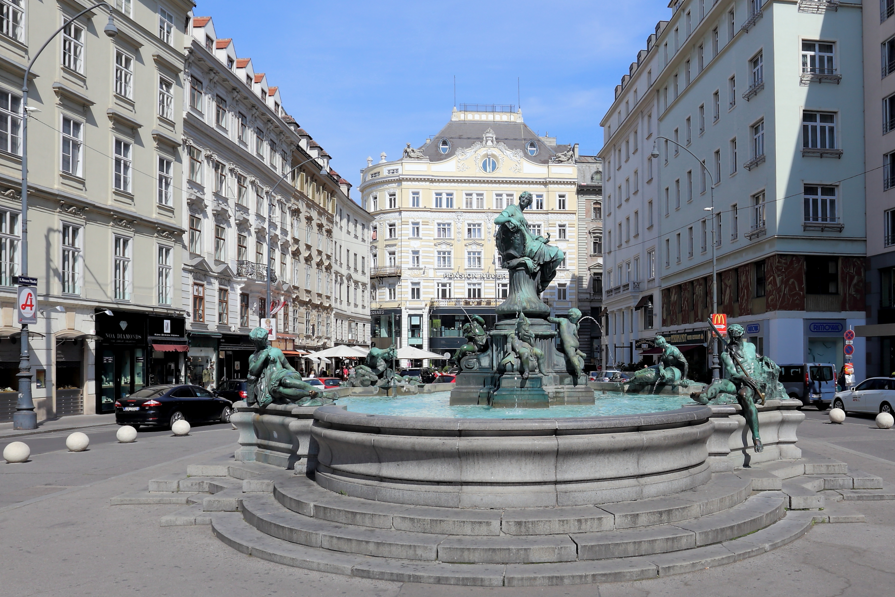 Der Donnerbrunnen, eigentlich Providentia-Brunnen, am Neuen Markt in der österreichischen Bundeshauptstadt Wien. Georg Raphael Donner errichtete ihn in den Jahren von 1737 bis 1739. Im Zentrum die Figur der Providentia, eine Allegorie der Voraussicht, mit 4 Putten. Am Brunnenrand befinden sich 4 Flussfiguren, die die Flüsse Enns (Fährmann), March (Frau), Traun (junger Fischer) und Ybbs (Quellnymphe) symbolisieren.